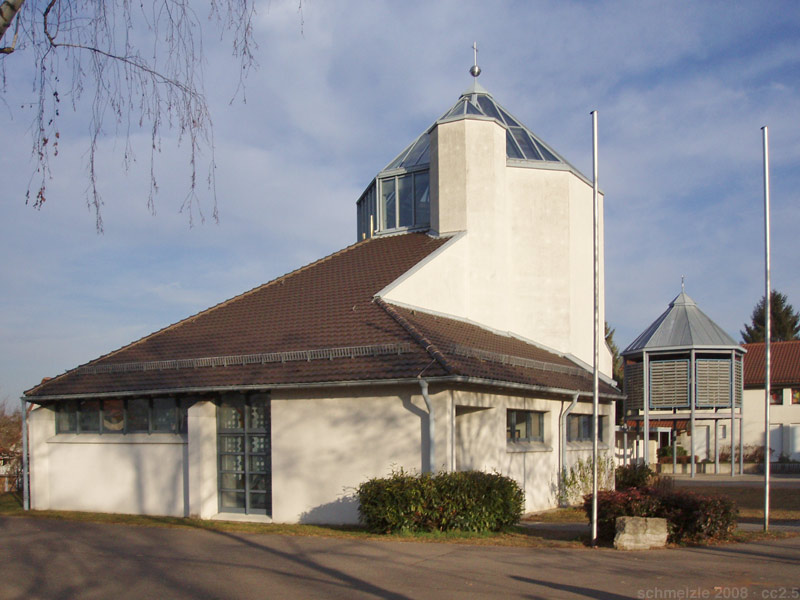 Katholische Pfarrkirche Heilig Kreuz im Kreuzgrund in Heilbronn-Böckingen